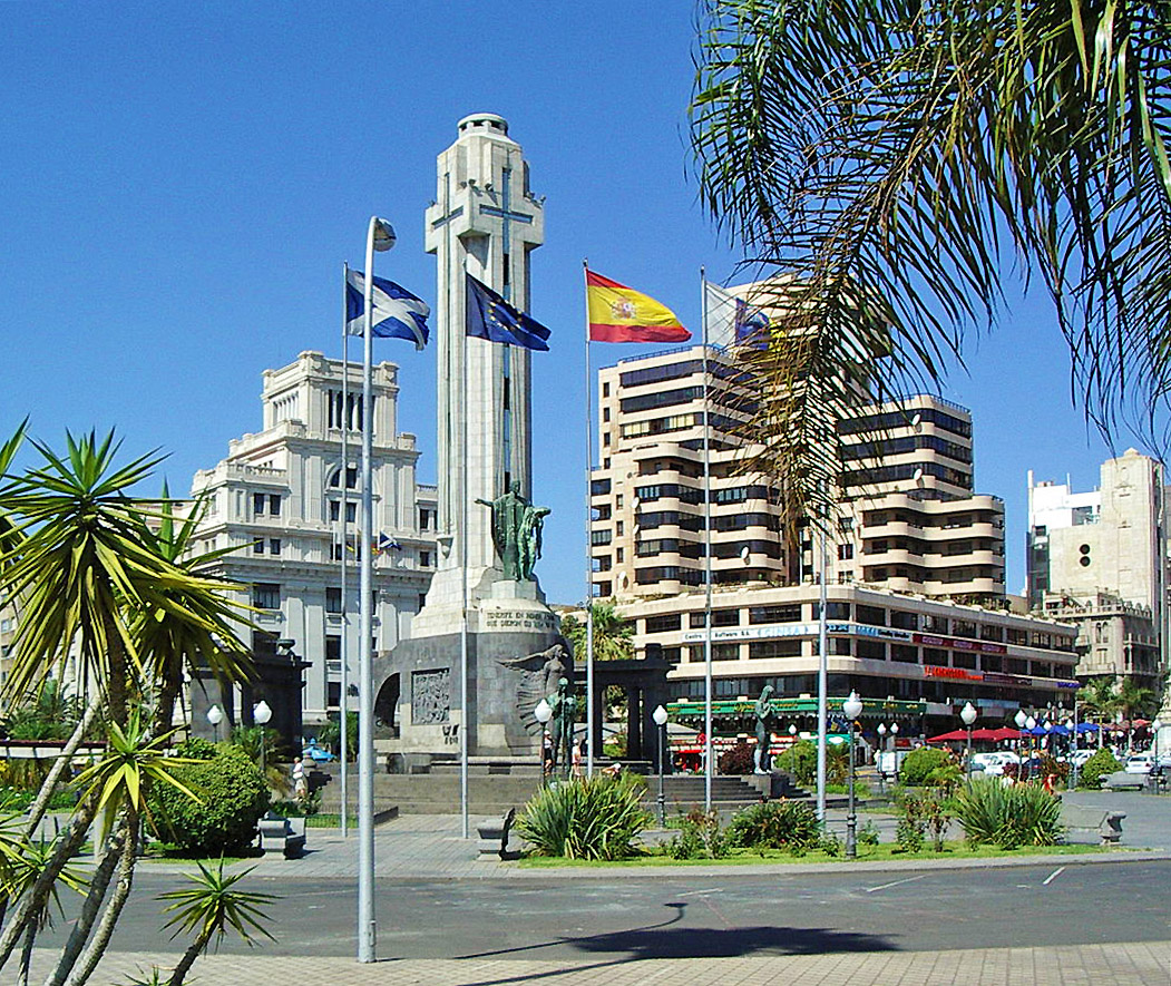 Santa Cruz de Tenerife - Plaza de Espana